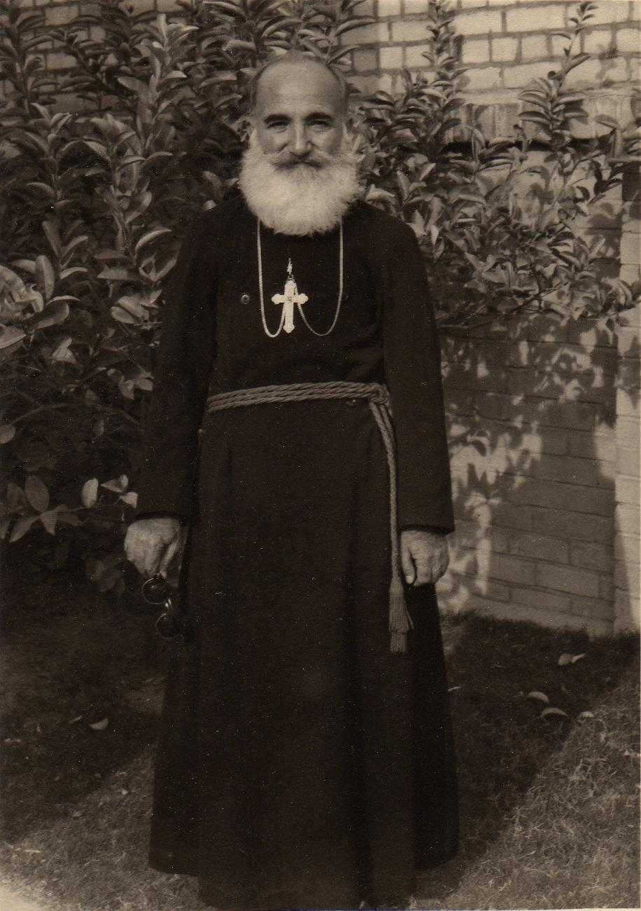 Józef Chnaniszo, biskup Asyryjskiego Kościoła Wschodu.